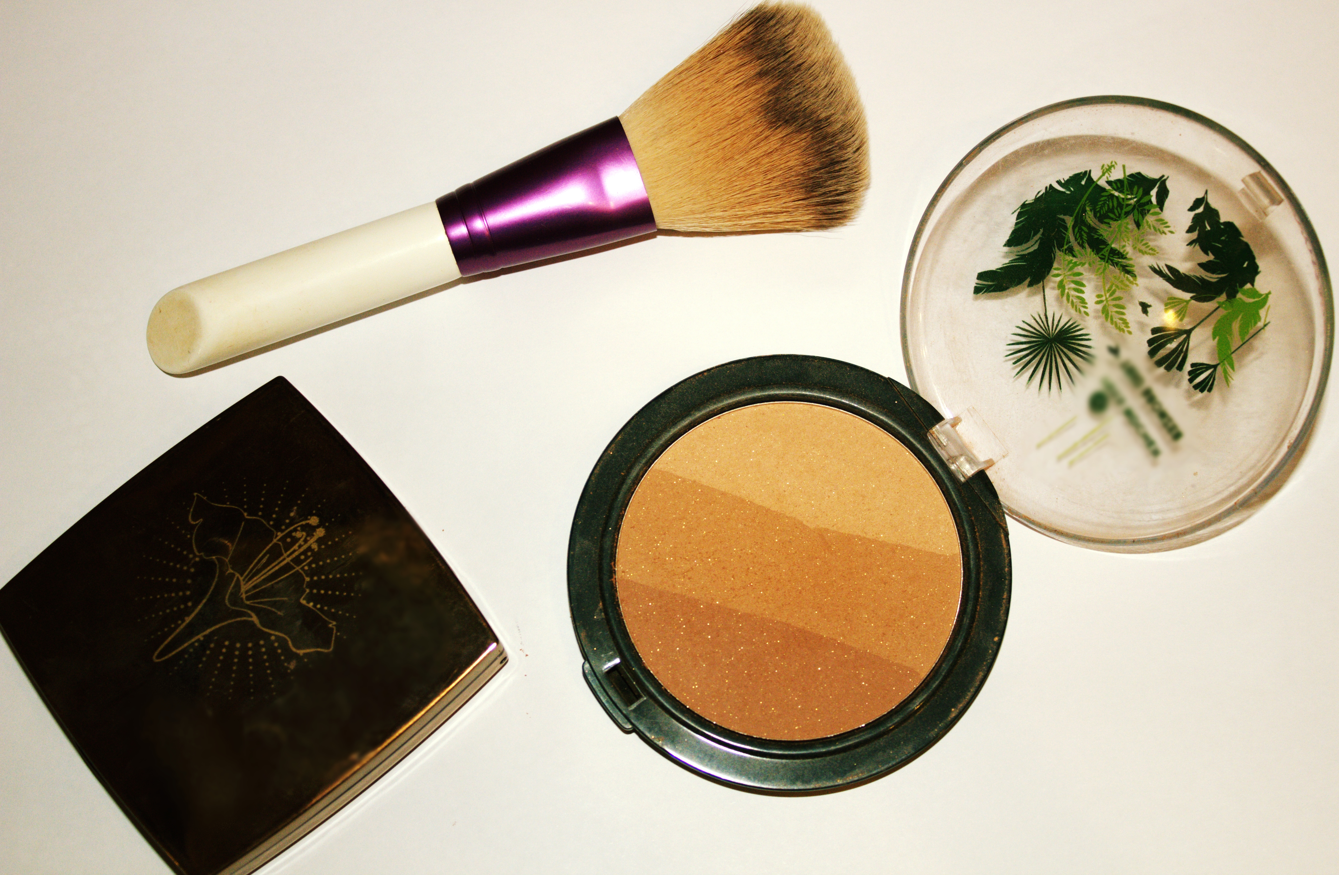 Productos para aplicar el contouring. Brocha para polvos y set de polvos.